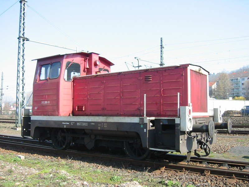 Diesellokomotive 312 200 selbst fotografiert HeizDampf 2004, Eisenach